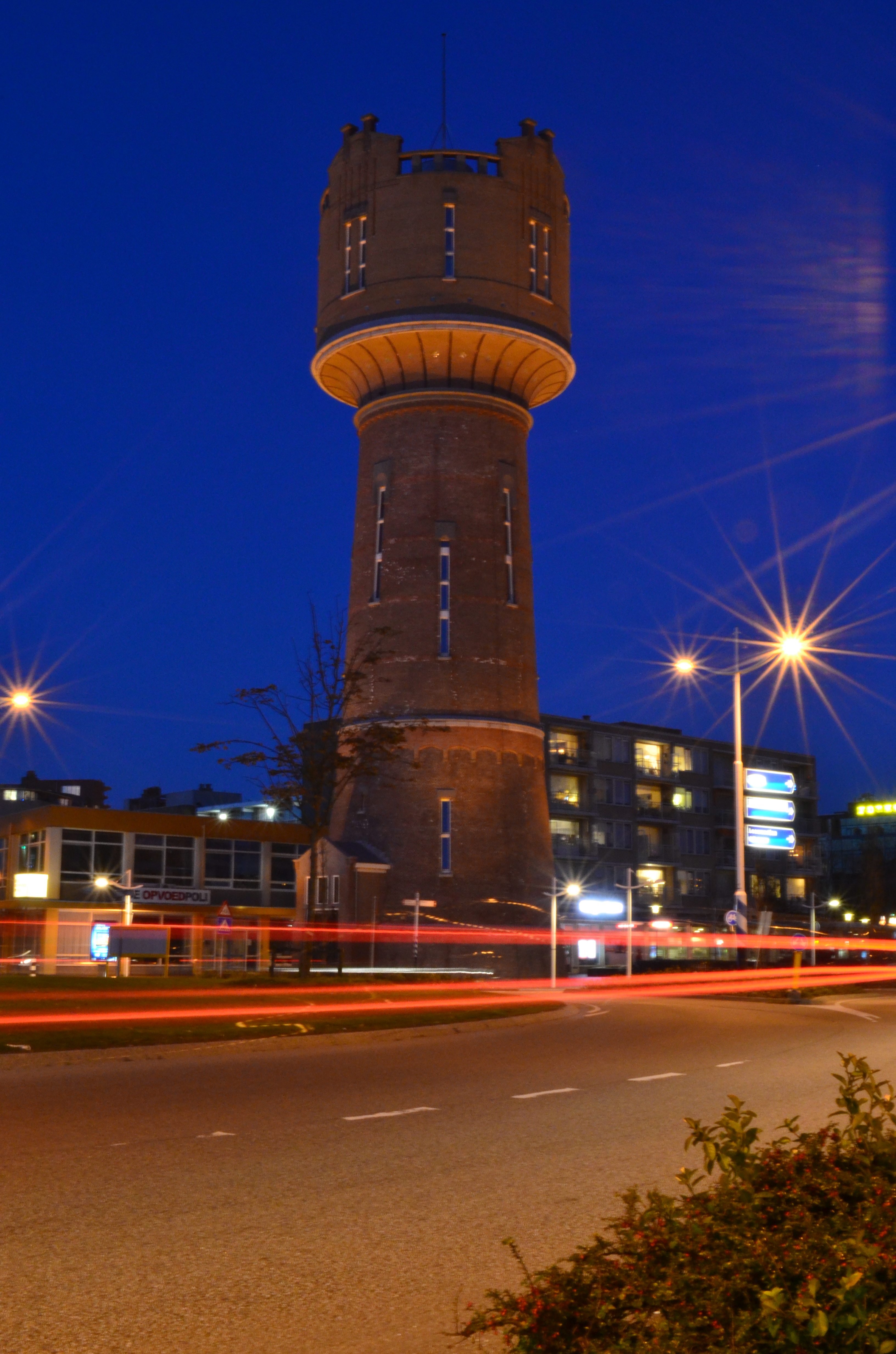 De watertoren van Den Helder in de avond.